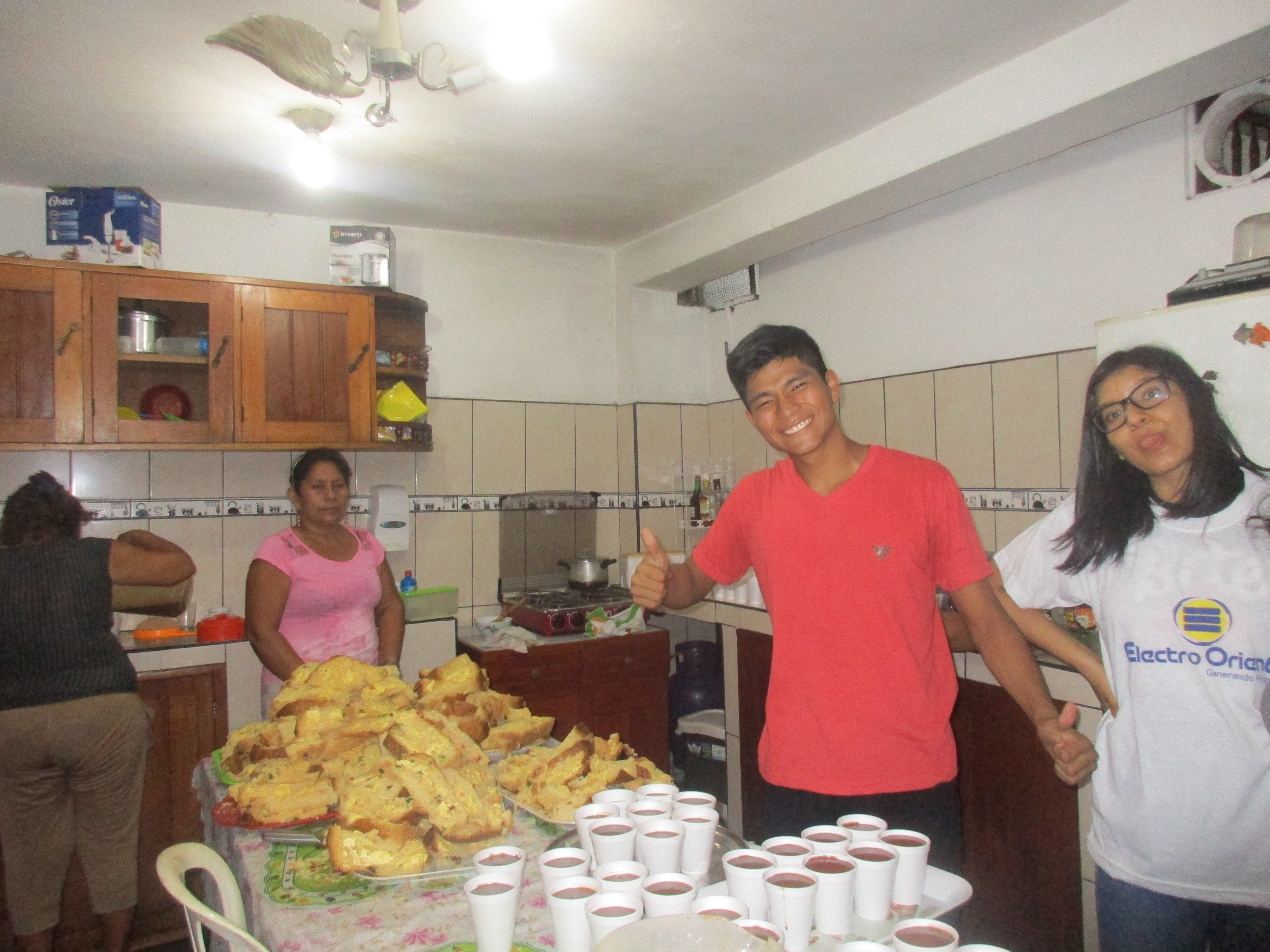 Chocolatada navideña en la ciudad peruana de Iquitos, 2017